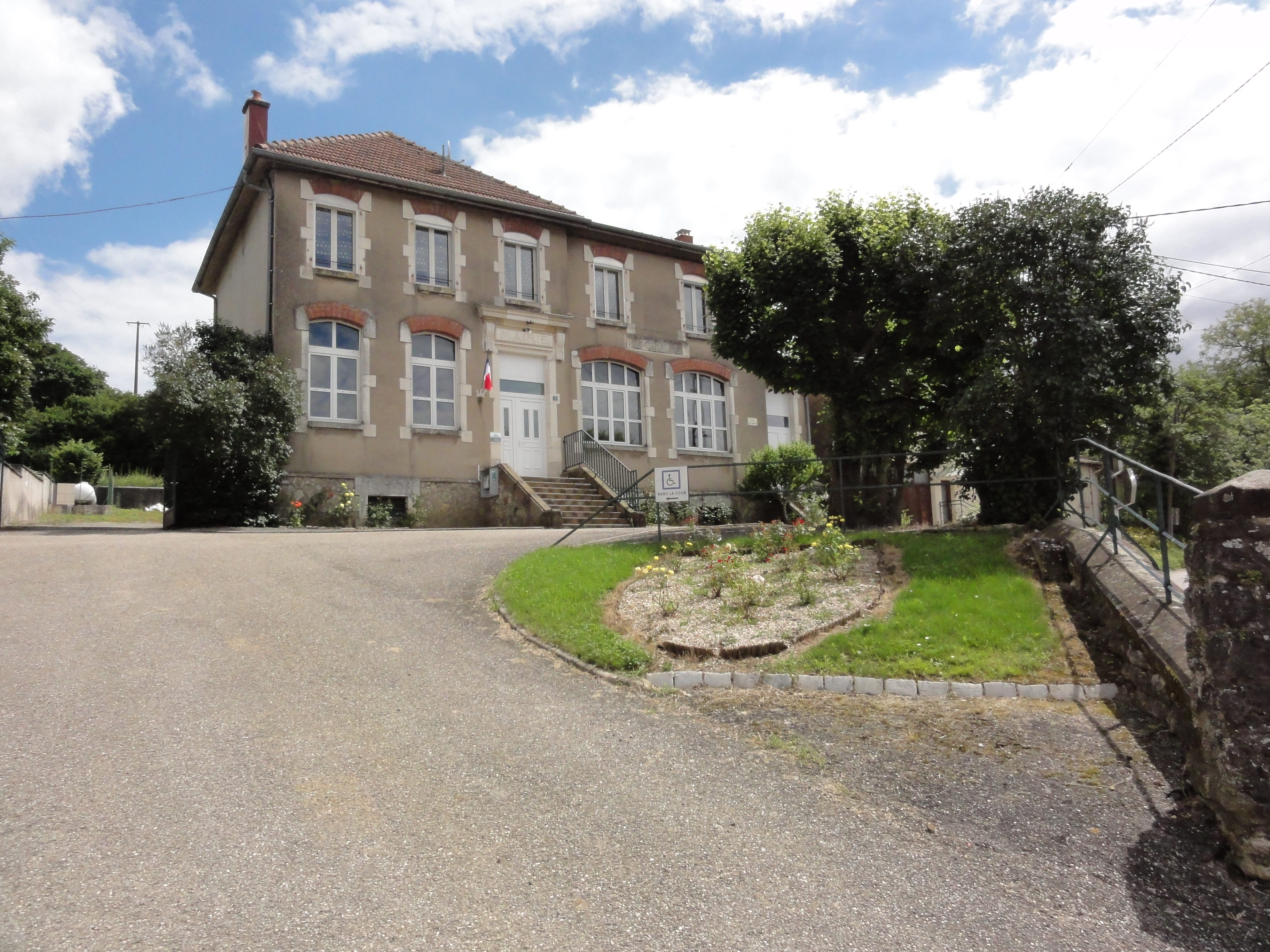 Autrepierre (M-et-M) mairie - école